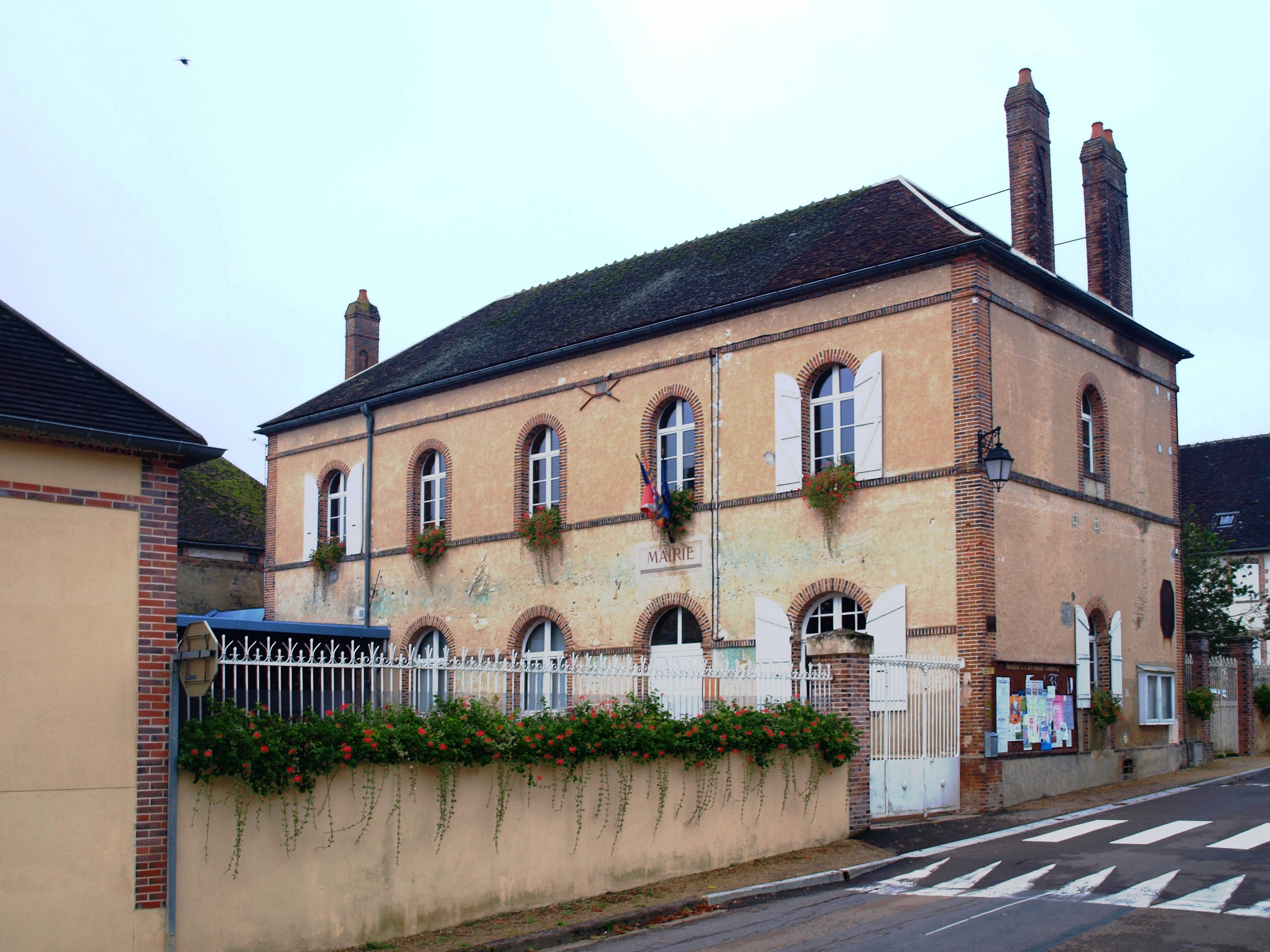 Villiers-sur-Tholon (Yonne, France) ; mairie.